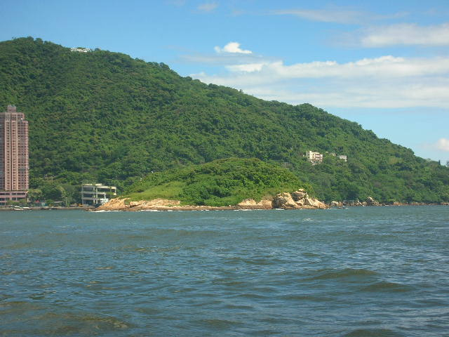 小青洲